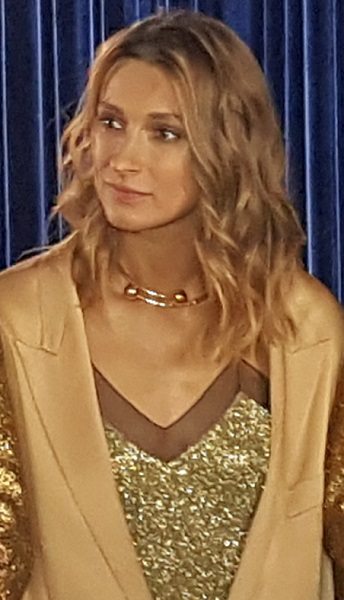 Ukraińska piosenkarka Tayanna podczas krajowych eliminacji do 63. Konkursu Piosenki Eurowizji "Widbir 2018".